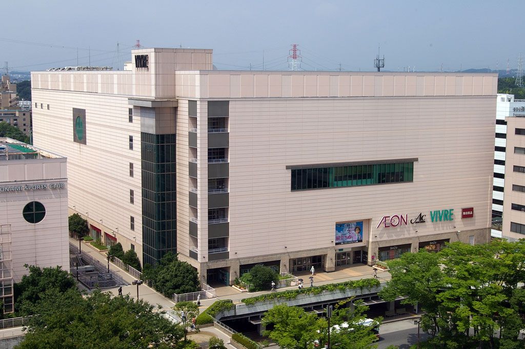 イオンシネマ新百合ヶ丘外観